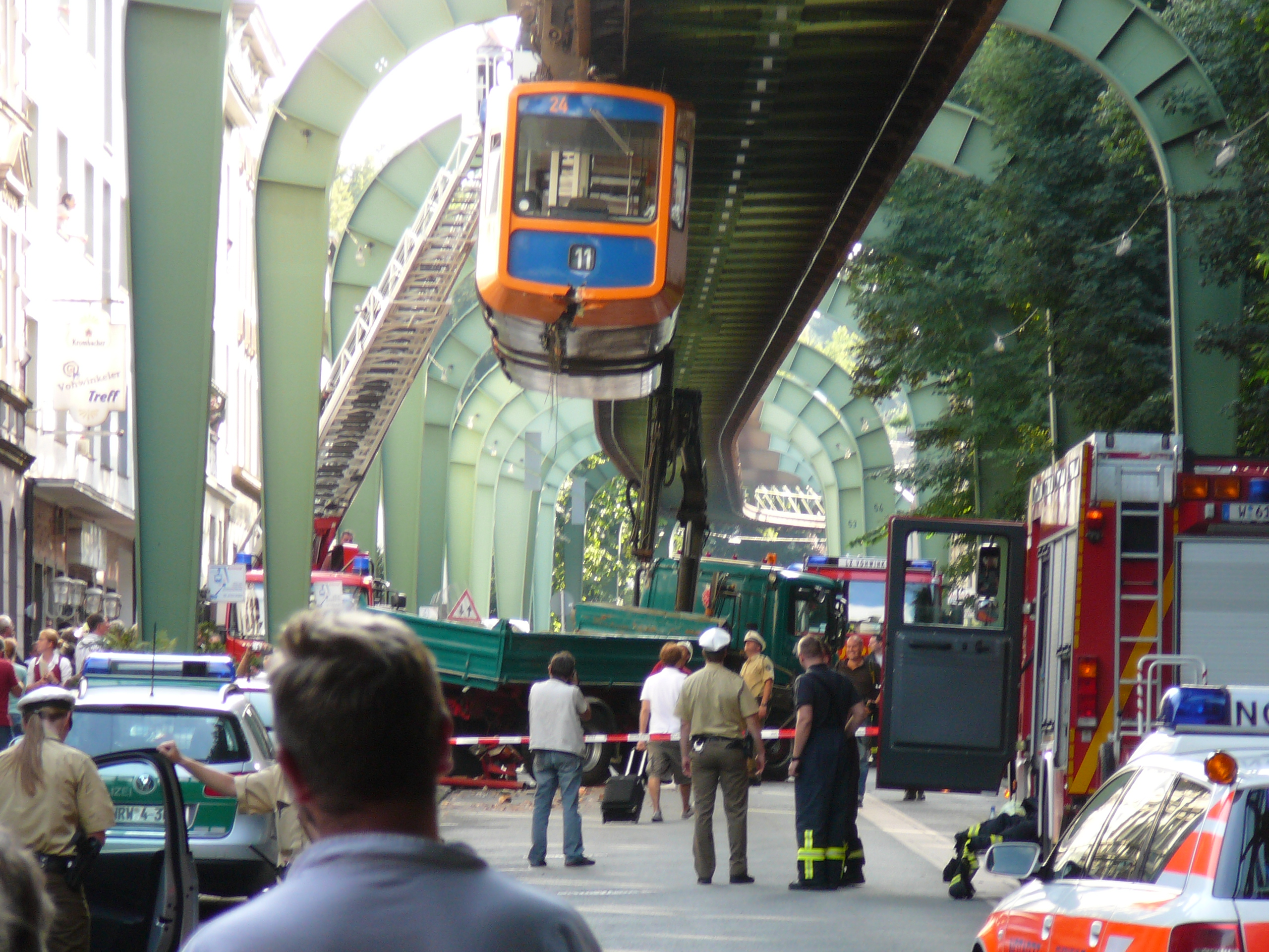 Schwebebahnunfall, Wuppertal